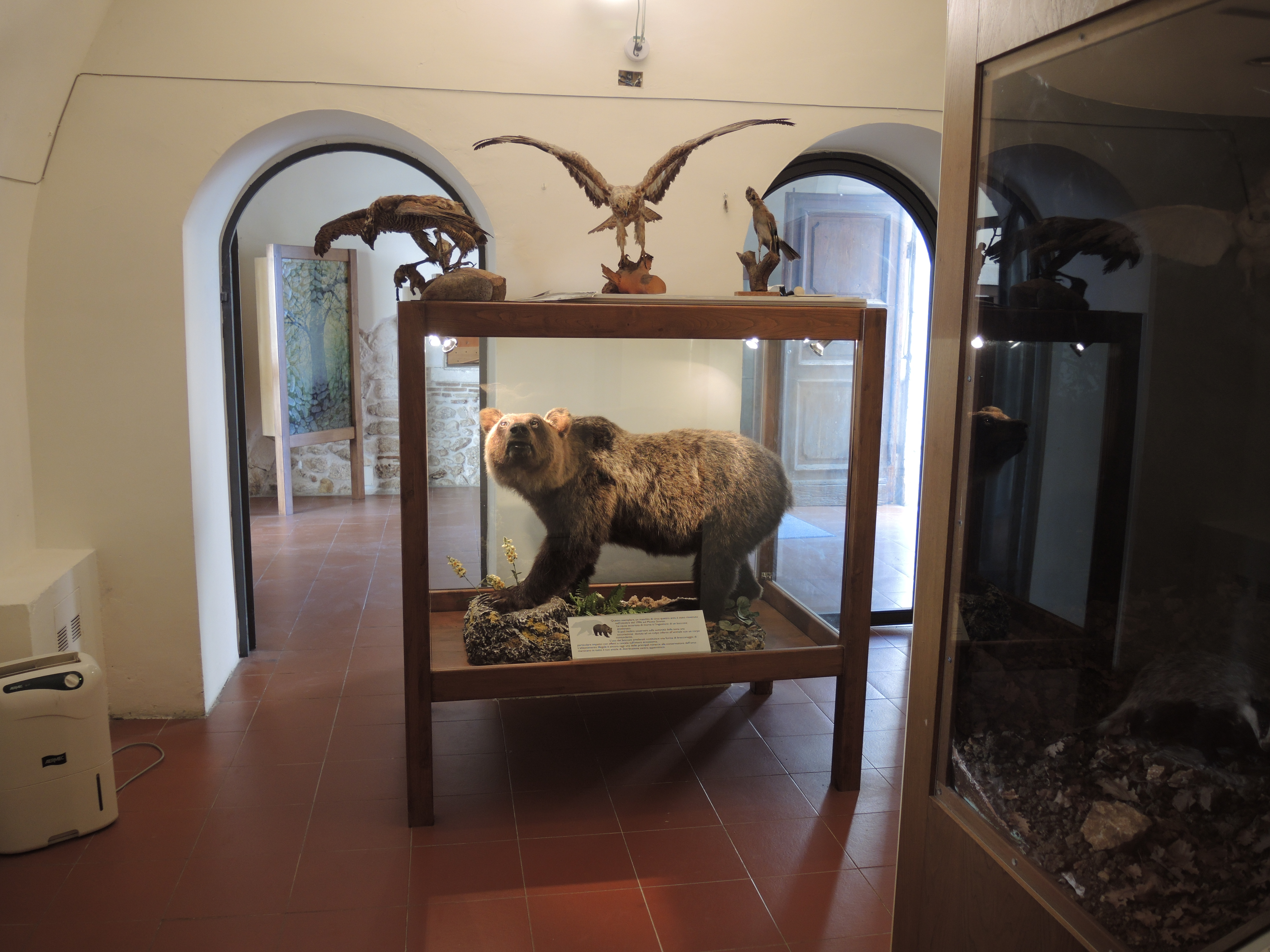 Gagliano Aterno: Convento di Santa Chiara